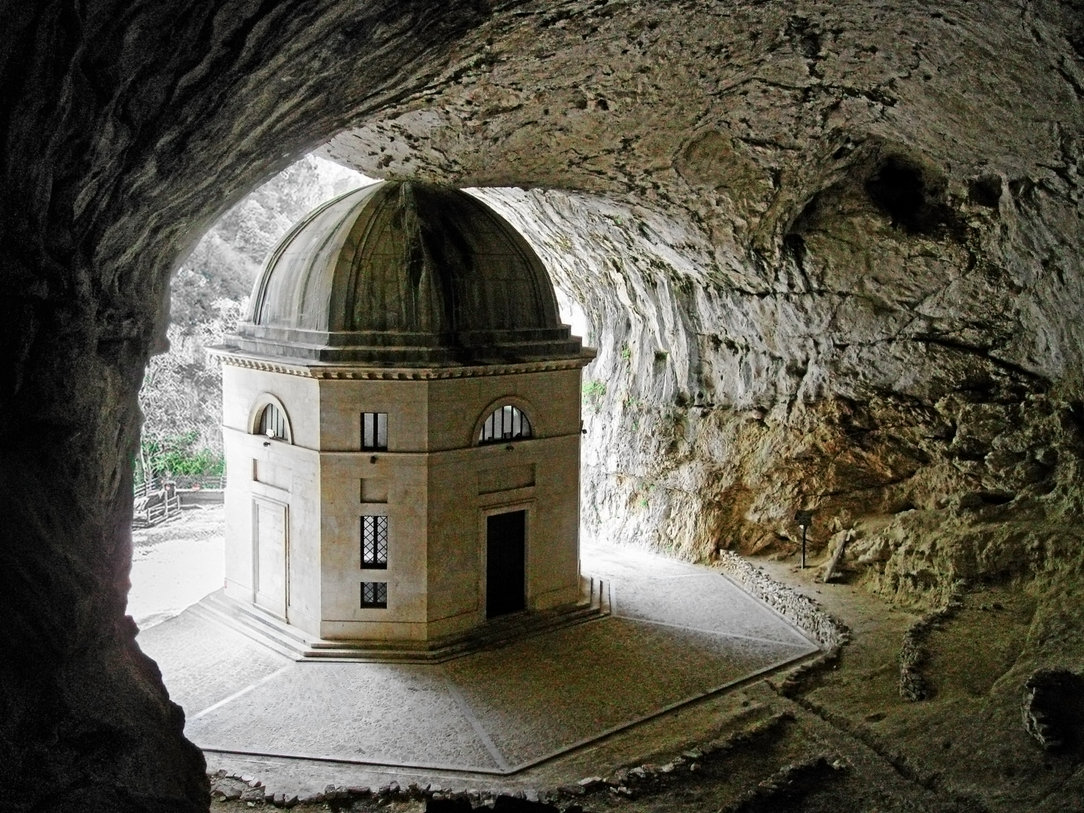 Tempio neoclassico, detto del Valadier, Genga, Italien